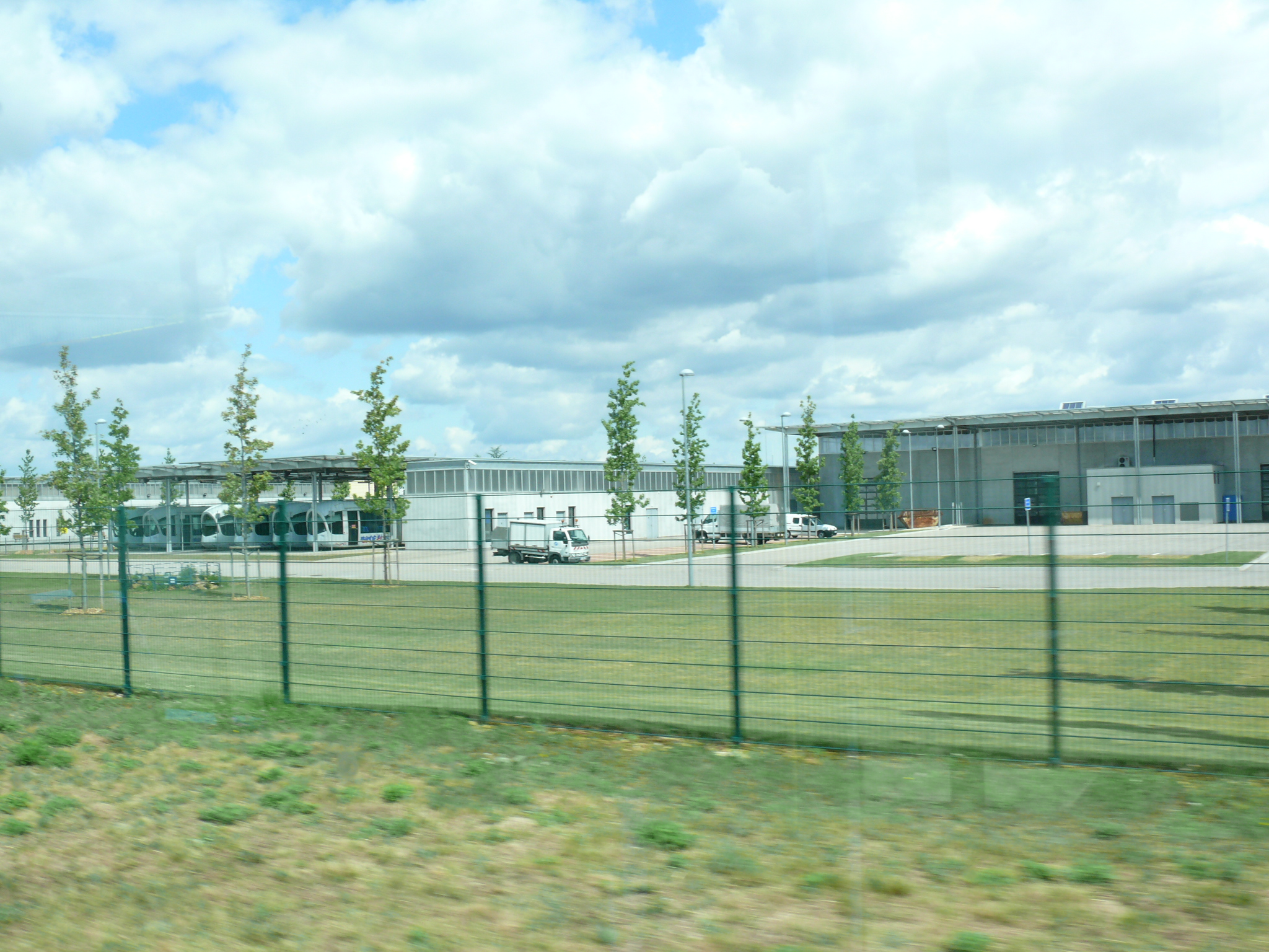 Tramway de Lyon - Ligne T3 - Unité de Transport Tramway Lea (Dépôt de Meyzieu) vu depuis une rame de la ligne